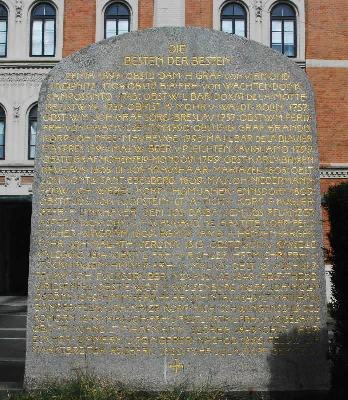 Die Gedenktafel "Die Besten der Besten" am Deutschmeister-Denkmal in Wien